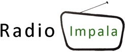 Logo von Radio Impala